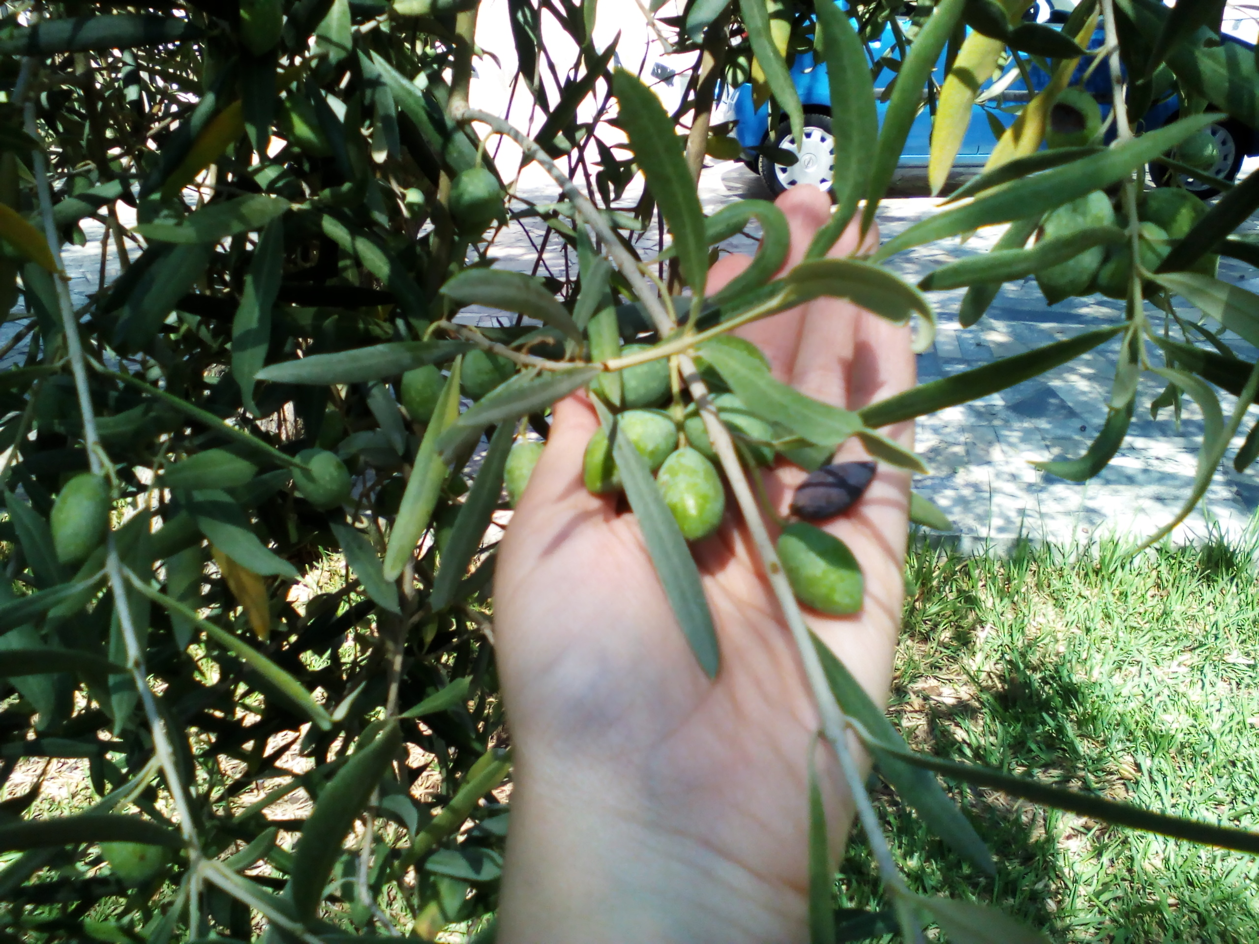 Albero d'ulivo a Solarino